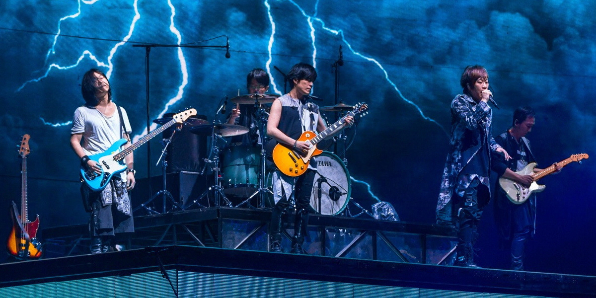 五月天 人生无限公司-长沙